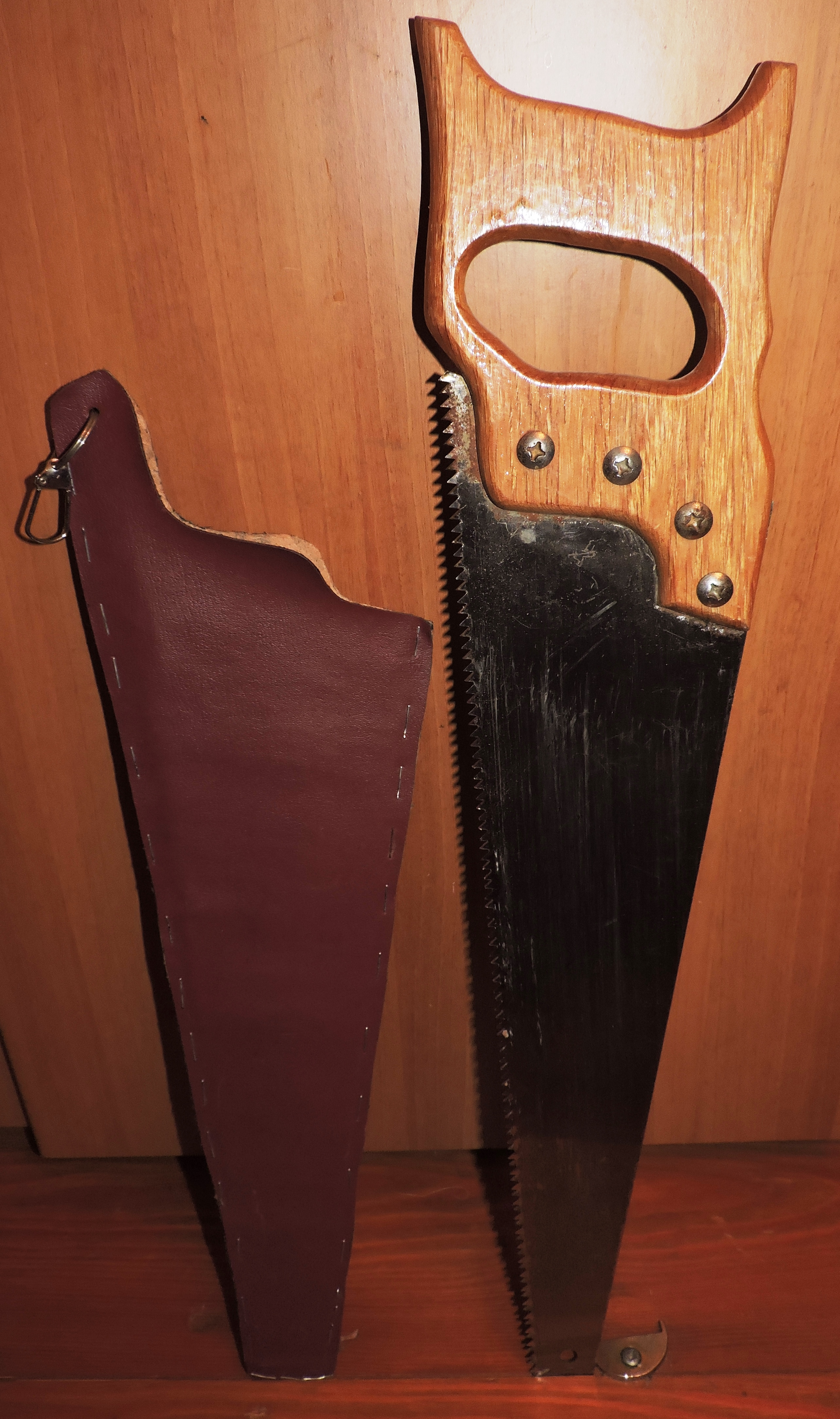 Ручная пила (ножовка) по дереву. Слева показан защитный чехол, сделанный автором фотографии специально для неё из дерматина. Обе части прошиты скобами для степлера